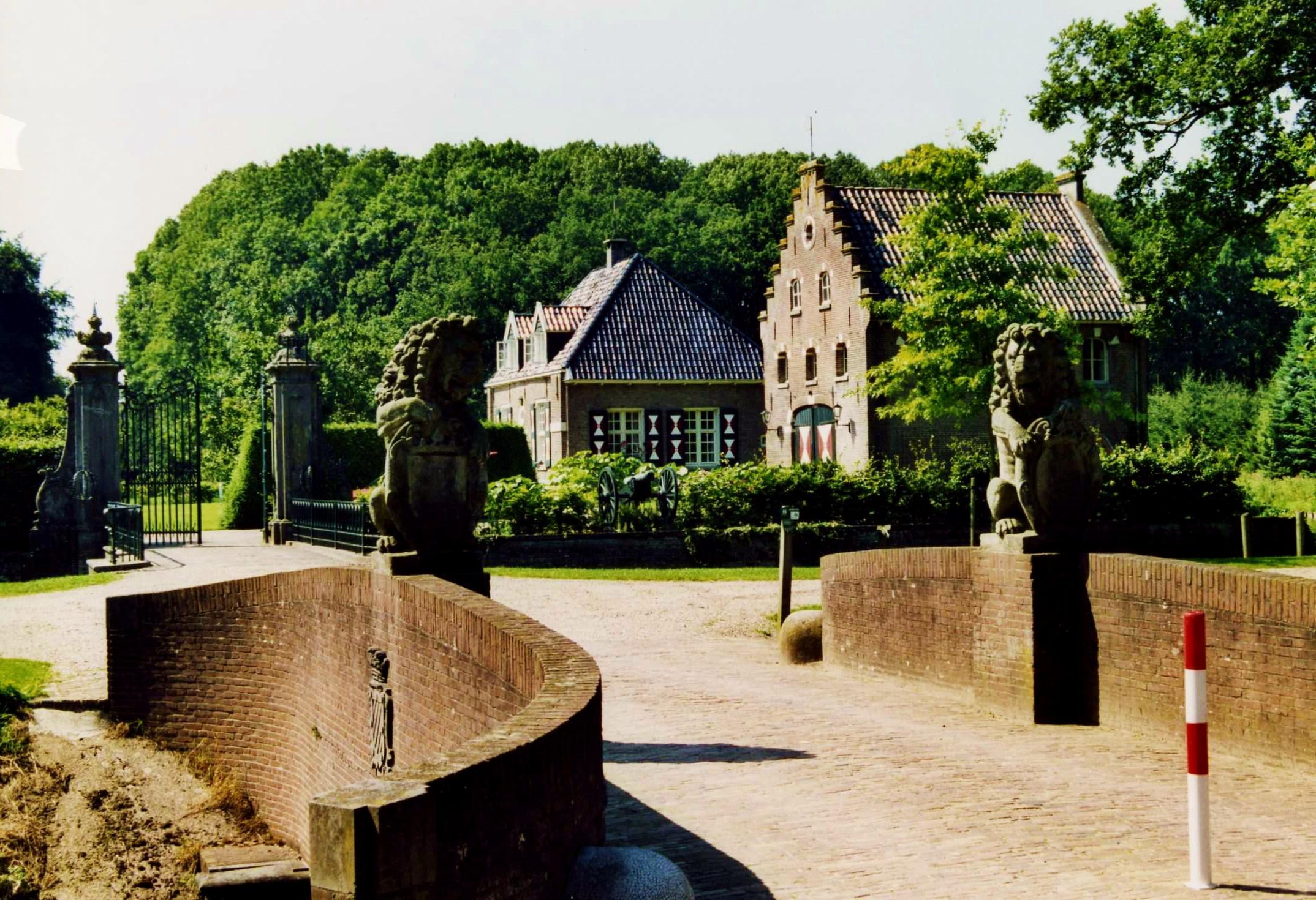 Geheel links het hek van het verdwenen huis De Gelder te Wijhe.